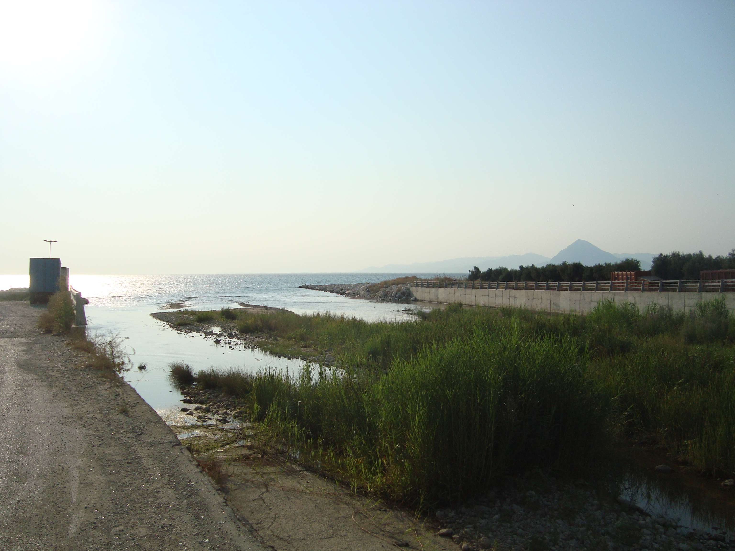 Οι εκβολές του ποταμού Γλαύκου στην Πάτρα